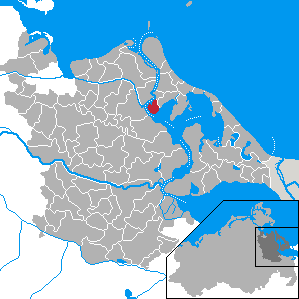 Sauzin, Landkreis Ostvorpommern, Mecklenburg-Vorpommern